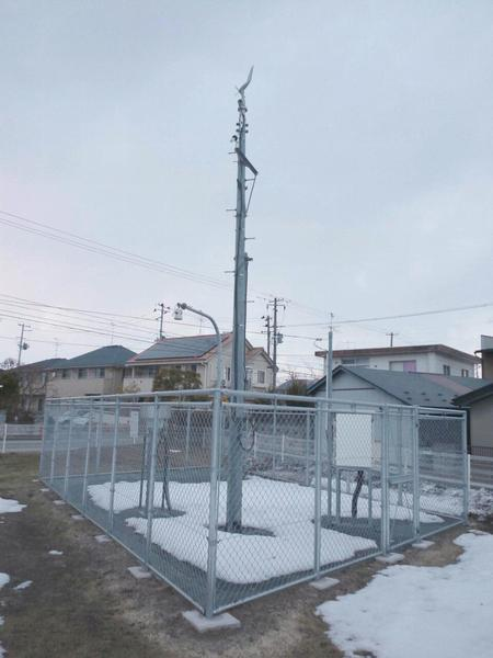 北上市のアメダス